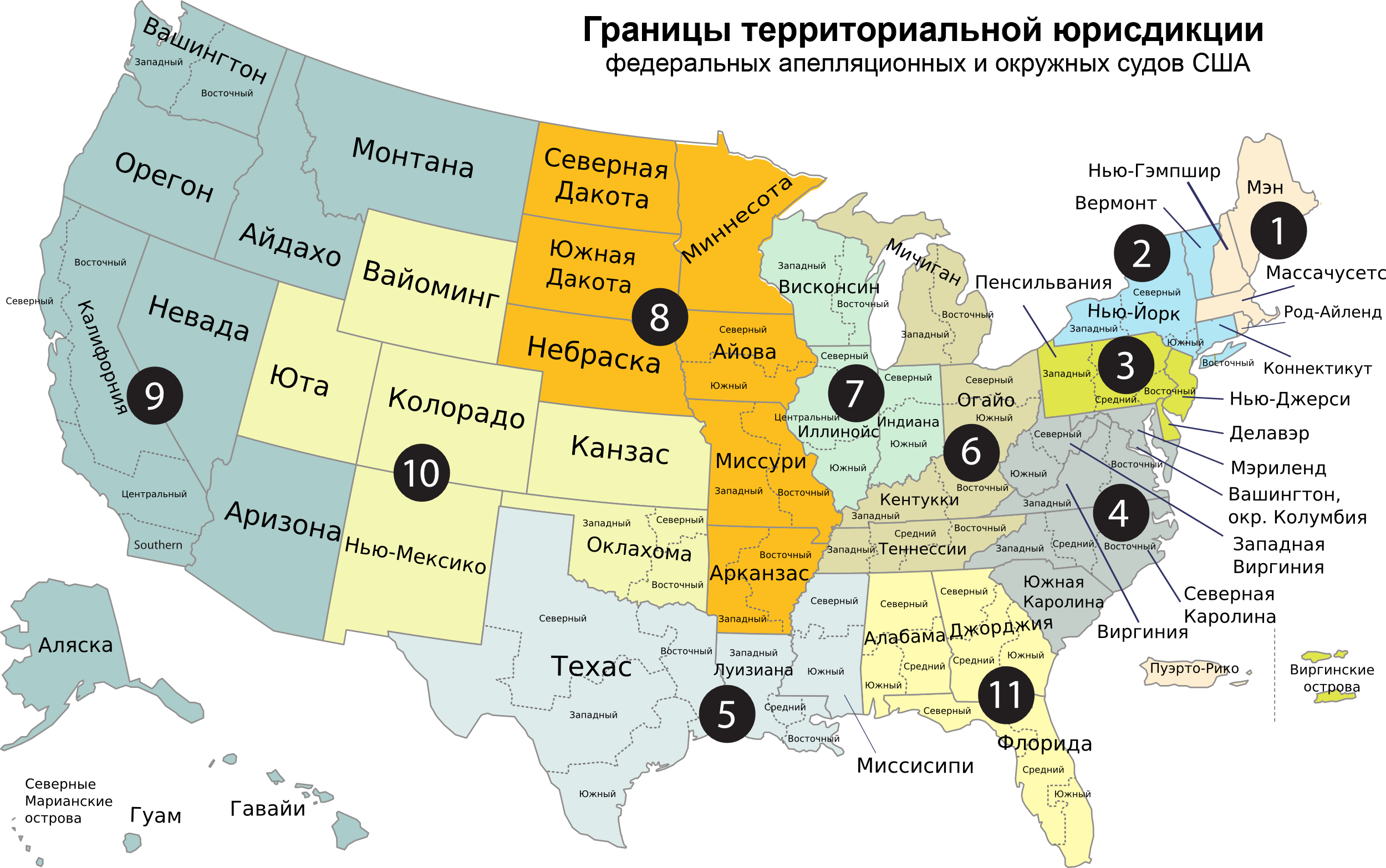 Карта федеральных апелляционных округов и федеральных судебных районов США.